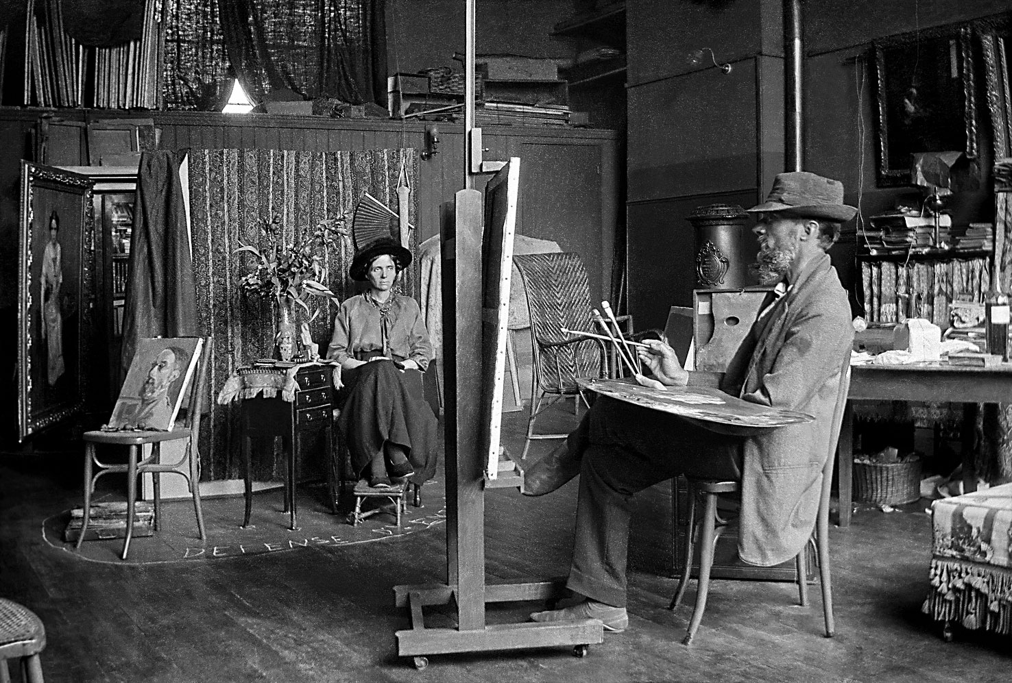 Étienne Buffet dans son atelier du 115, boulevard Saint Michel Paris 5ème en octobre 1916